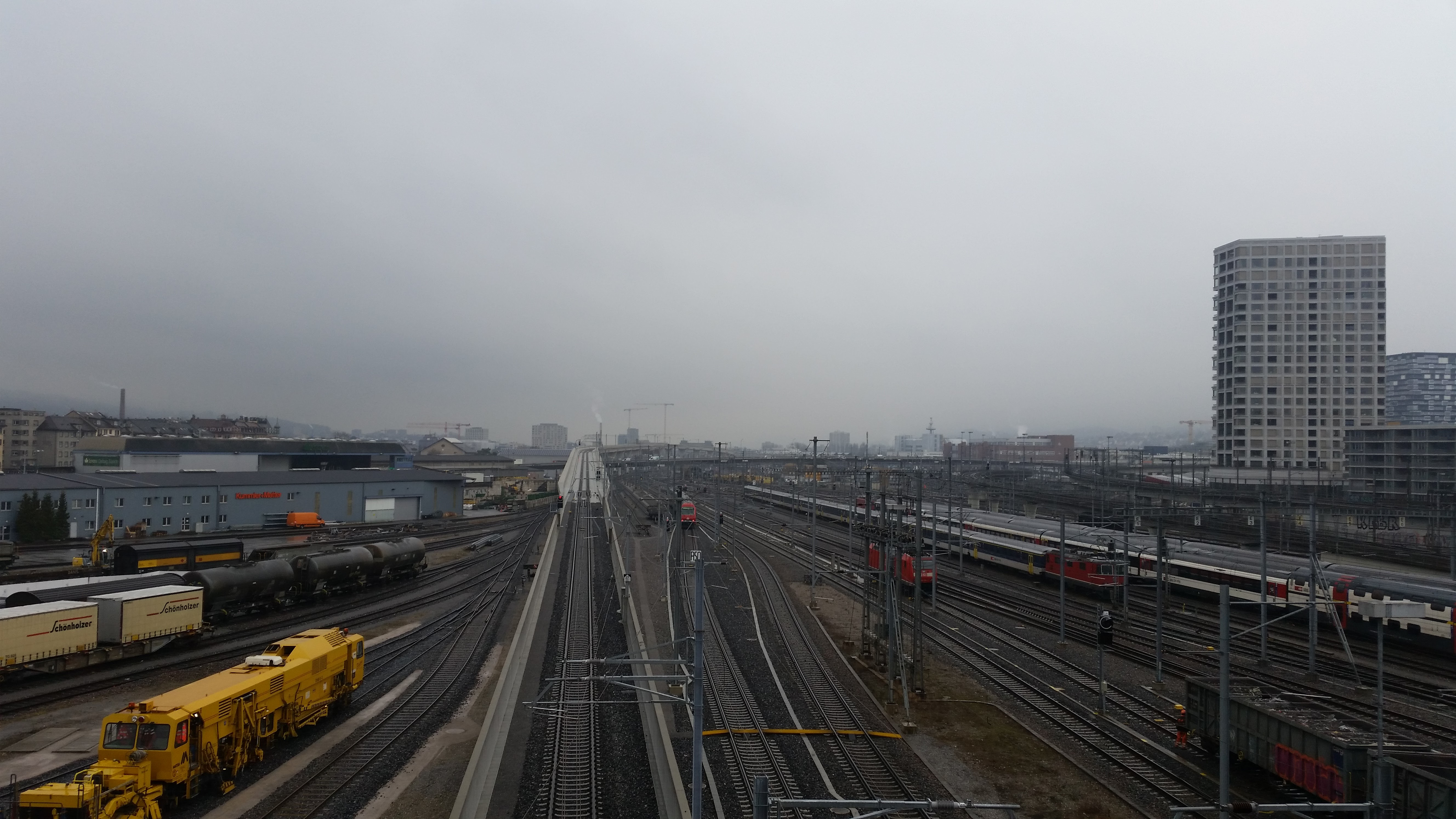 Letzigrabenbrücke in Zürich